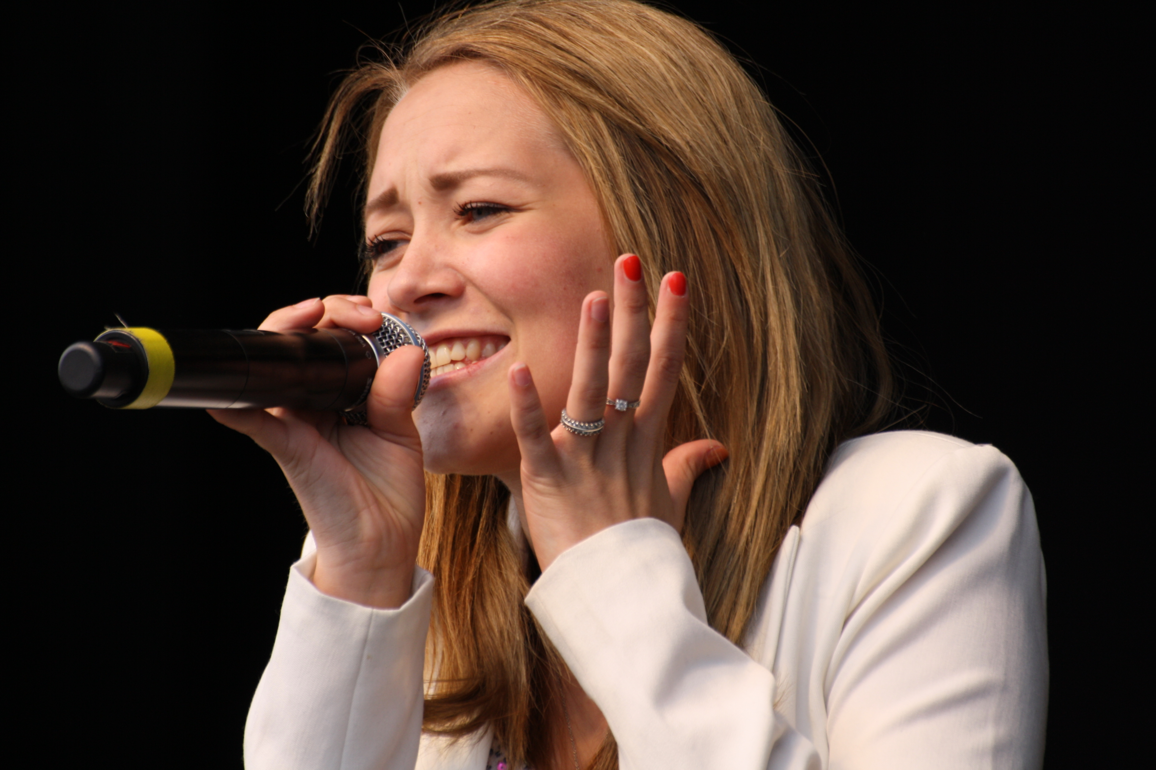 Musiker Malin Reitan bidro til feiringen.